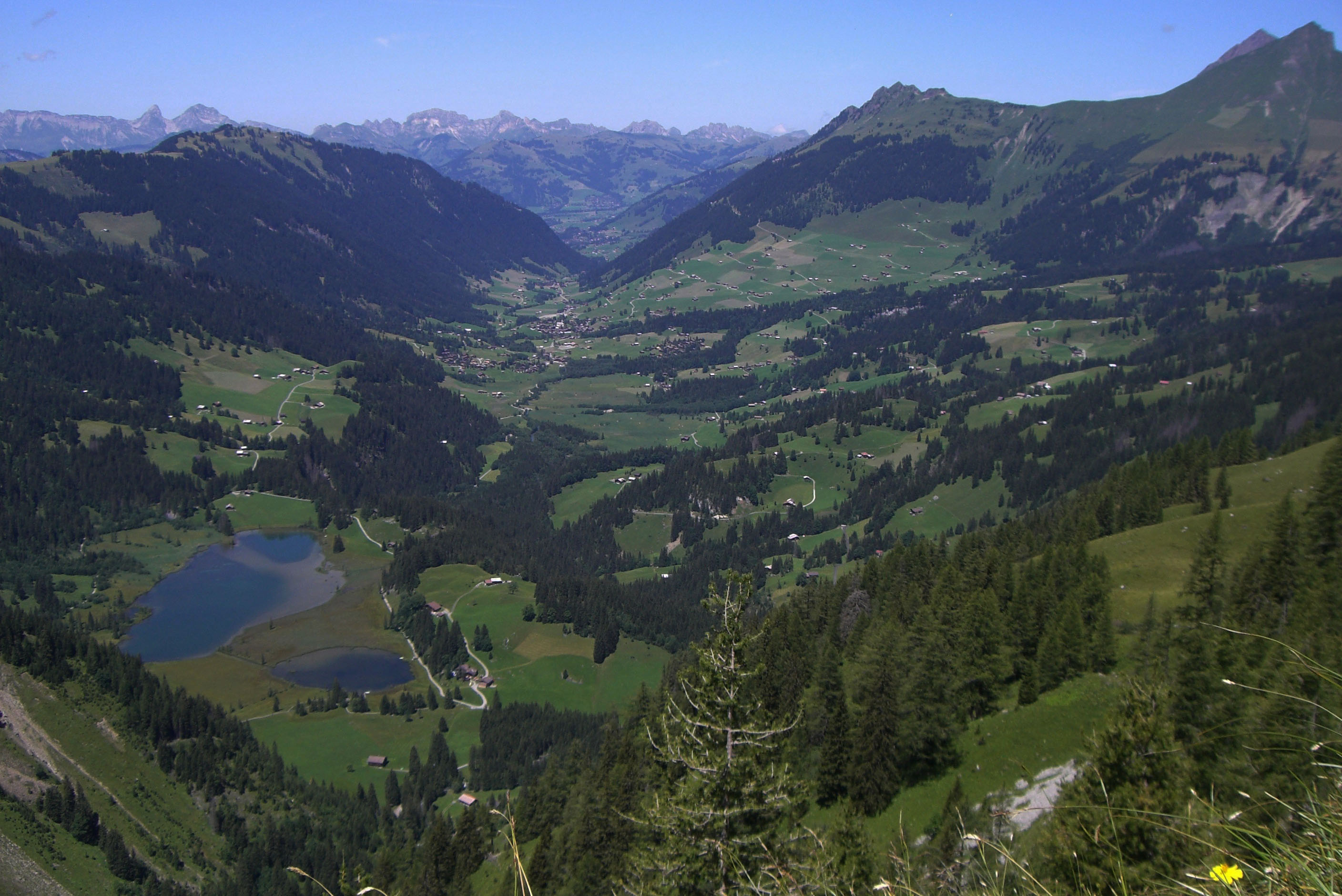 Links der Lauenensee, im Hintergrund das Dorf Lauenen.